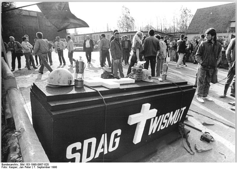 ADN- Jan-Peter Kasper 7.9.90 Gera: Arbeitskampf- Ein symbolischer Sarg und schwarze Fahnen bestimmten das Bild im Bergbaubetrieb Schmirchau der SBAG Wismut. Mit Grubenbesetzungen demonstrierten die Kumpel des Uranbergbaus in Sachsen und Thüringen gegen das drohende "Aus" für Tausende Arbeitsplätze.